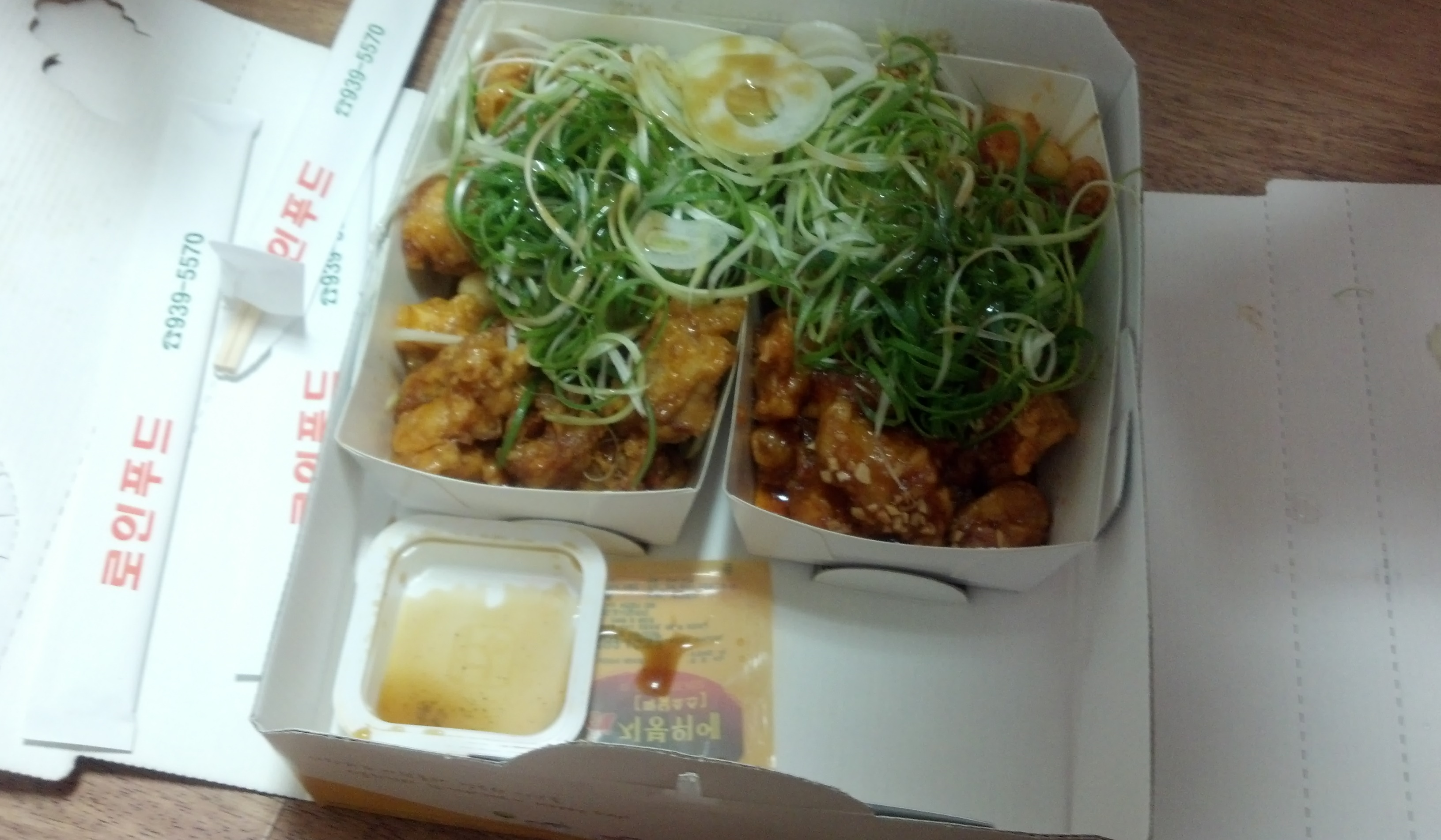 fried chicken with scallion